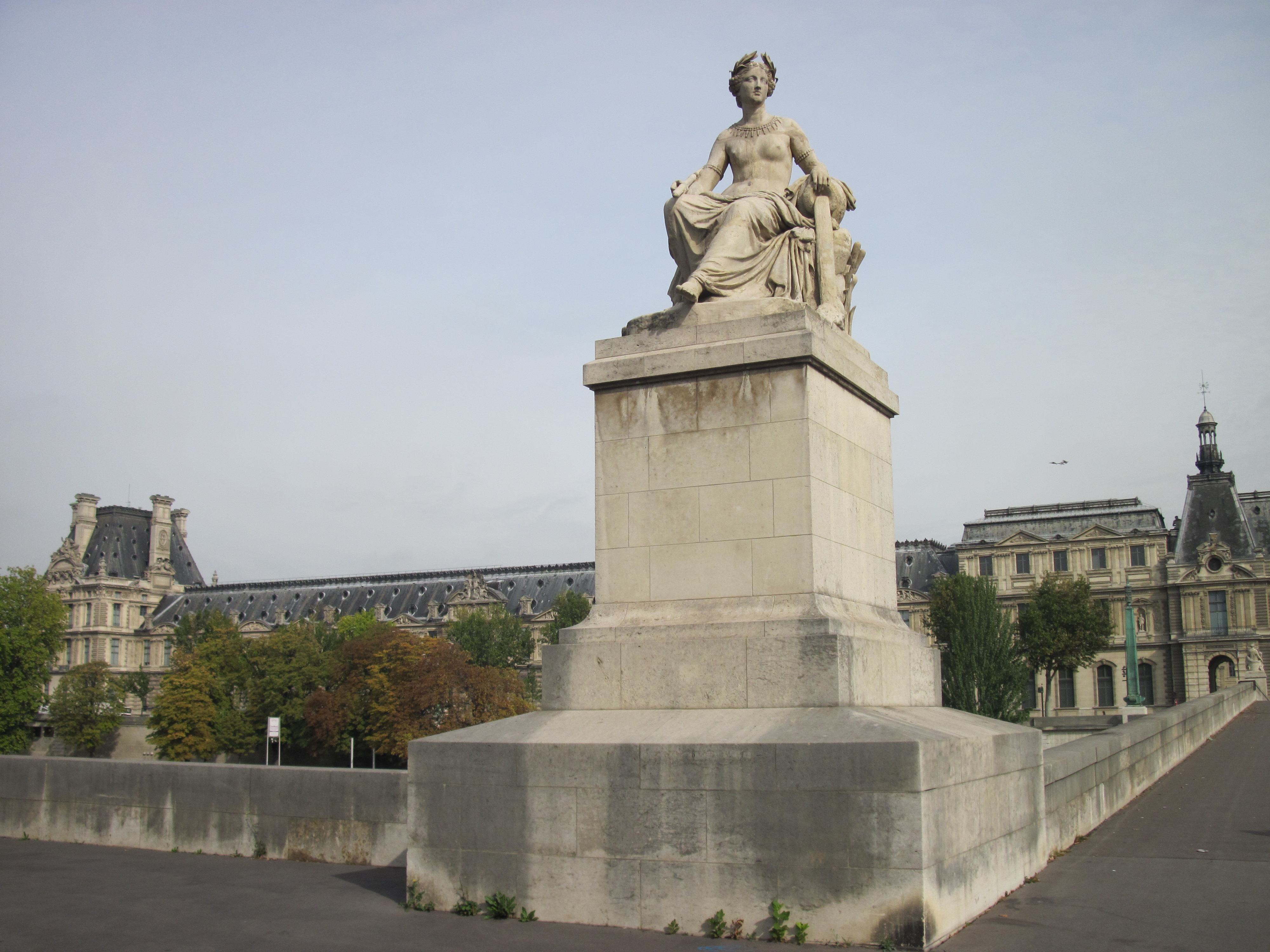 Статуя Сена (Louis Petitot) на мосту Каррузель.